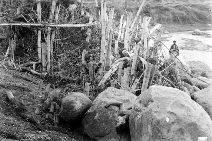 Repronegatief. Slachtoffers van de eruptie van de Keloed